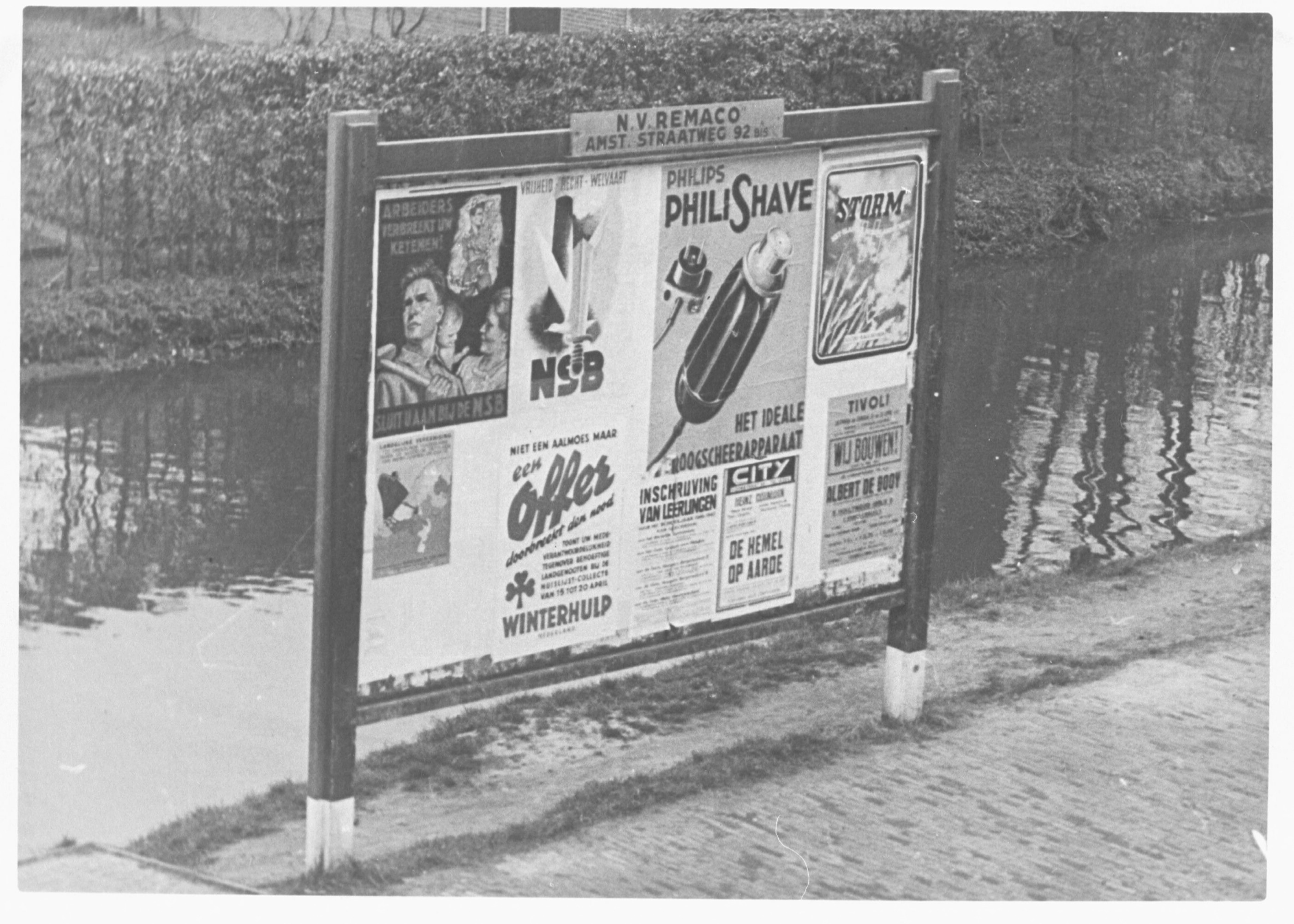 De NSB hield zich intensief bezig met propaganda. Affiches en plakkaten overspoelden Nederland, zowel vóór als tijdens de oorlog. Deze foto is afkomstig uit het archief van de Fotodienst der NSB.